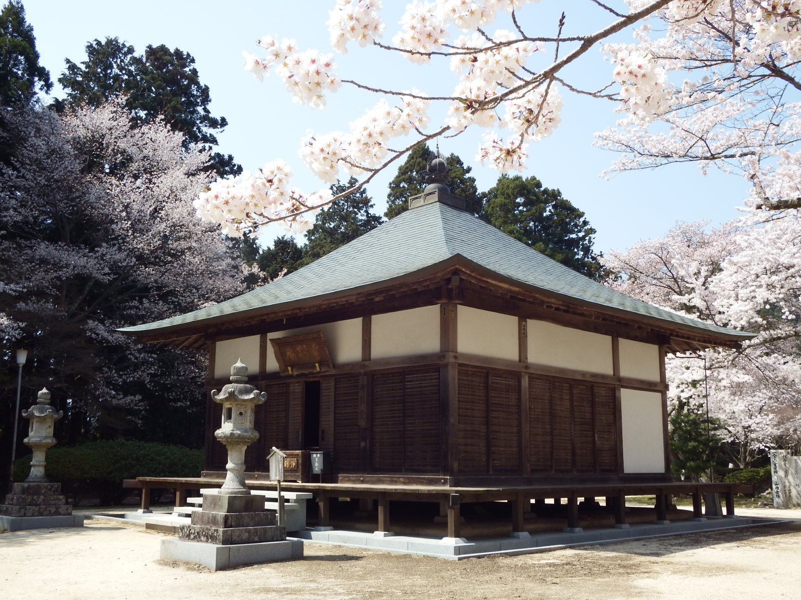 箸蔵寺 大師堂